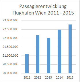 Passagierzahlen Flughafen Wien von 2011 bis 2015